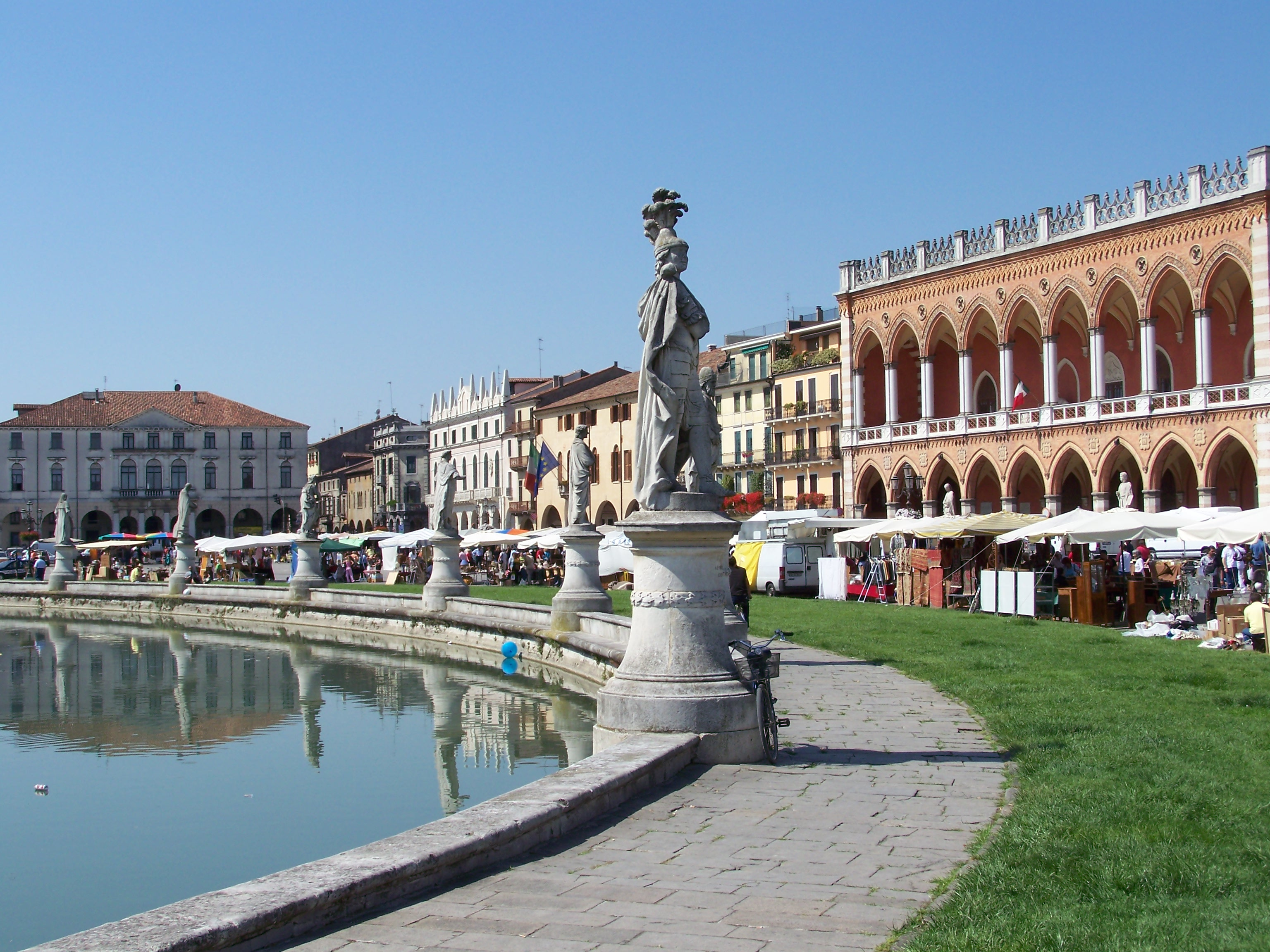 market day at the Prato della Valle, padova, Italy